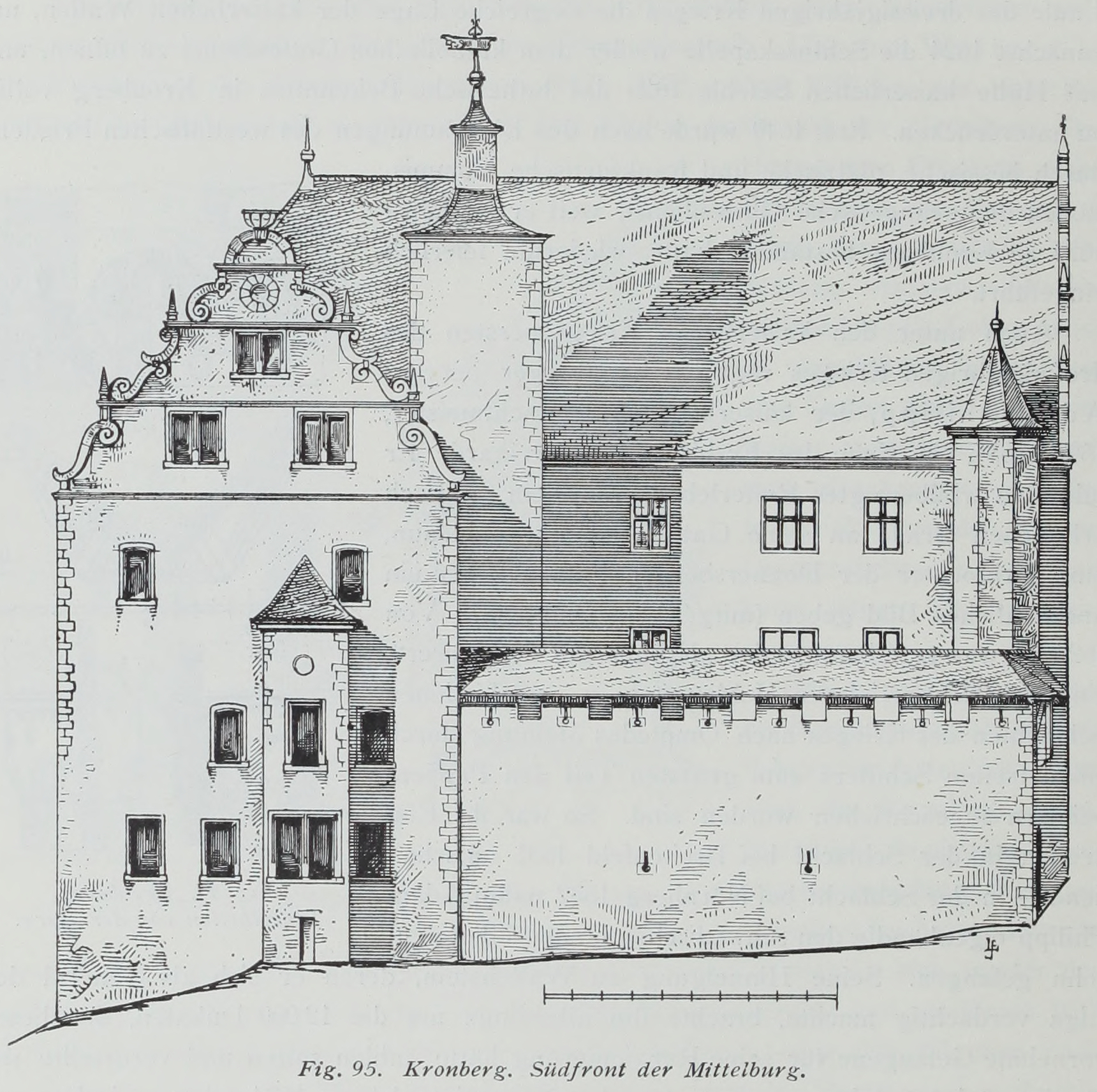 Kronberg Südfront der Mittelburg